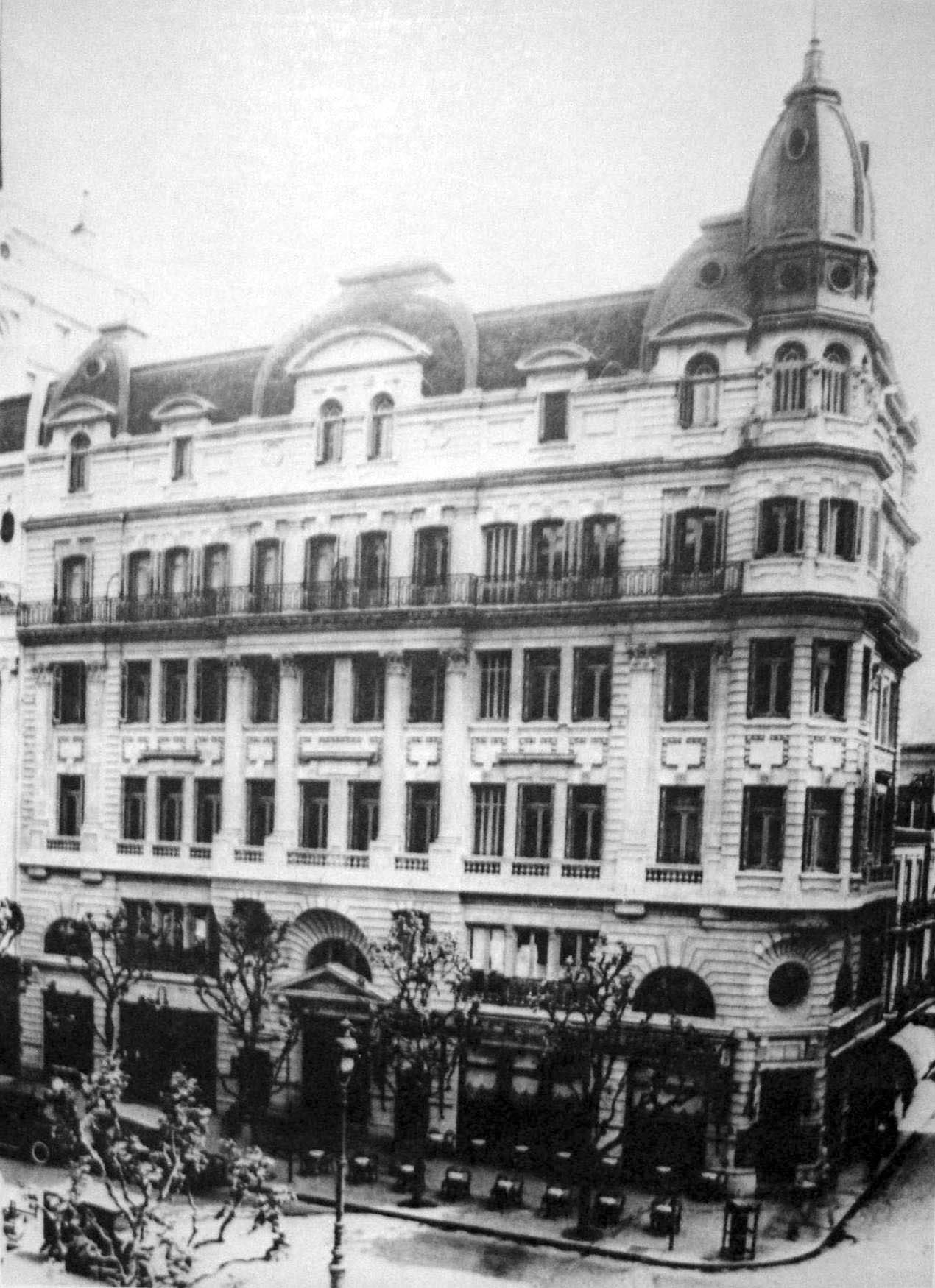 Antiguo edificio proyectado por el arquitecto Edwin Merry en la esquina noroeste del cruce de la Avenida de Mayo y la calle Chacabuco. Lo ocupó en 1900 la compañía de seguros La Rosario. En la planta baja funcionaba el Café Madrid. Hoy su terreno lo ocupa la Torre La Buenos Aires.